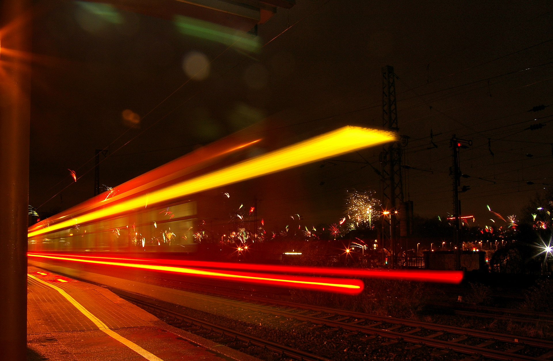 S-Bahn des VRR Linie S6 in Fahrtrichtung Köln-Nippes auf S-Bahnhof Düsseldorf-Oberbilk an der Philipshalle in der Neujahrsnacht 2007 (Langzeitbelichtung mit Feuerwerk)